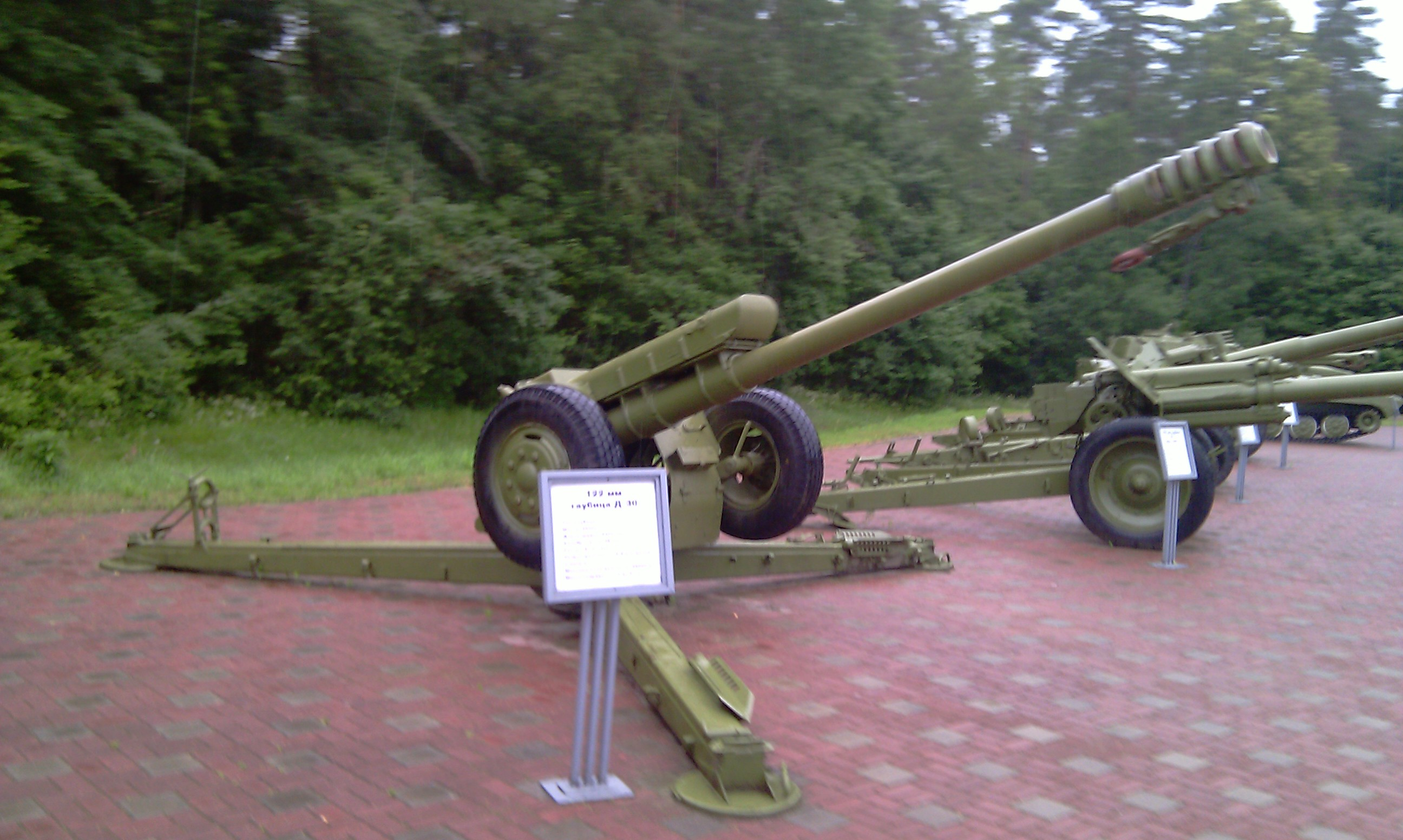 Мемориал - экспозиция военной техники. Артиллерия.